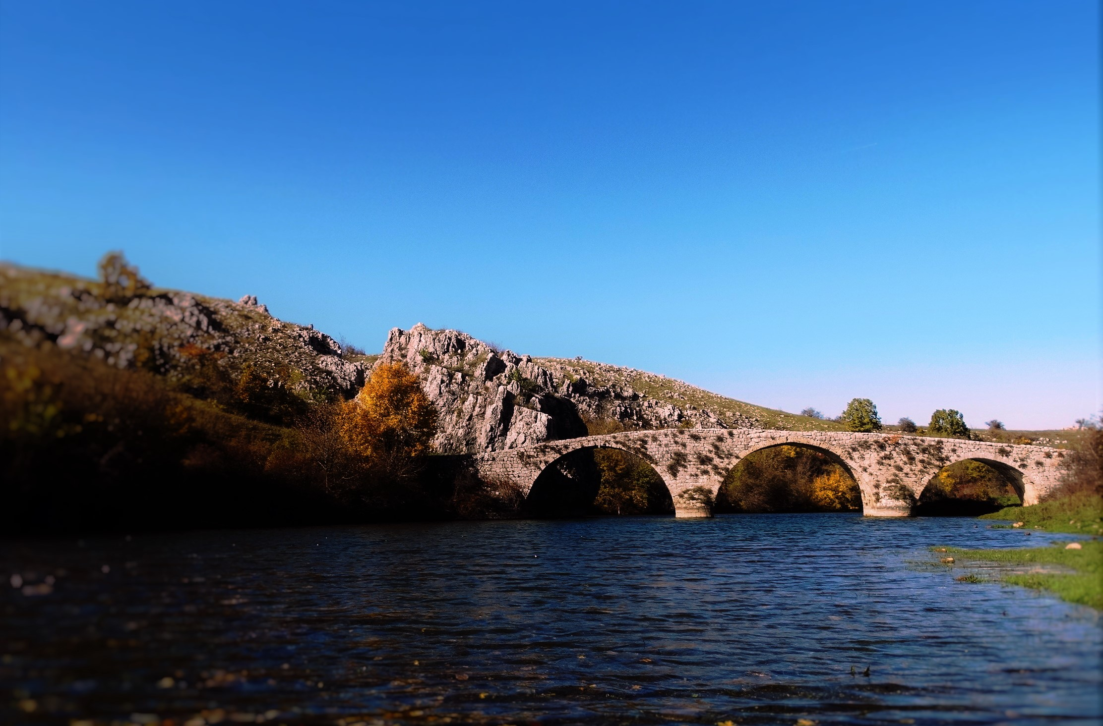 ’’Ovčiji brod’’, most koji se nalazi u Nevesinjskom selu Bratač, remek-djelo tadašnjeg neimarstva, građevina je koju su Osmanlije podigle najvjerovatnije u XVI vijeku ili kasnije, a naziv dali čobani koji su preko njega prevodili svoja stada.Sagrađen je mnogo prije višegradske Na Drini ćuprije. Po jednoj verziji gradio ga je čuveni turski graditelj Hajrudin, istovremeno sa gradnjom starog mosta u Mostaru. Izgrađen je u potpunosti od kamena, širok je oko tri metra i svojim vitkim izgledom, sa tri luka, neodoljivo podsjeća na umanjenu verziju Ćuprije na Drini u Višegradu. Uprkos svojoj starosti, i vrlo malo restauracija, most je dobro očuvan pa se i danas koristi. Most, zajedno sa nekropolom stećaka Kalufi, je predložen za nominaciju i oni su potencijalni kandidati za uvrštavanje u UNESCO-vu listu Svjetskog kulturnog nasljeđa. NKD481